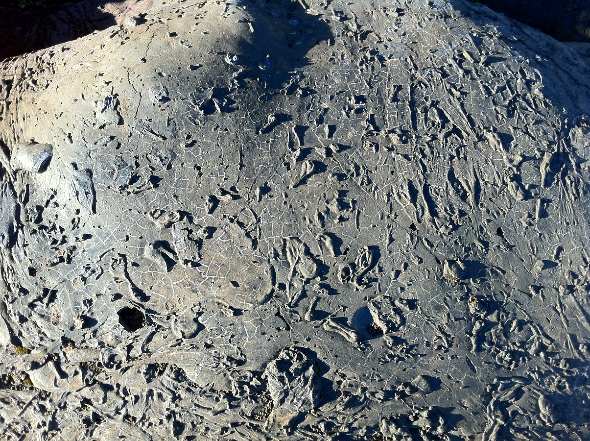 Слёзы Пеле на лаве. Иллюстрация для викиучебника Гавайеведение